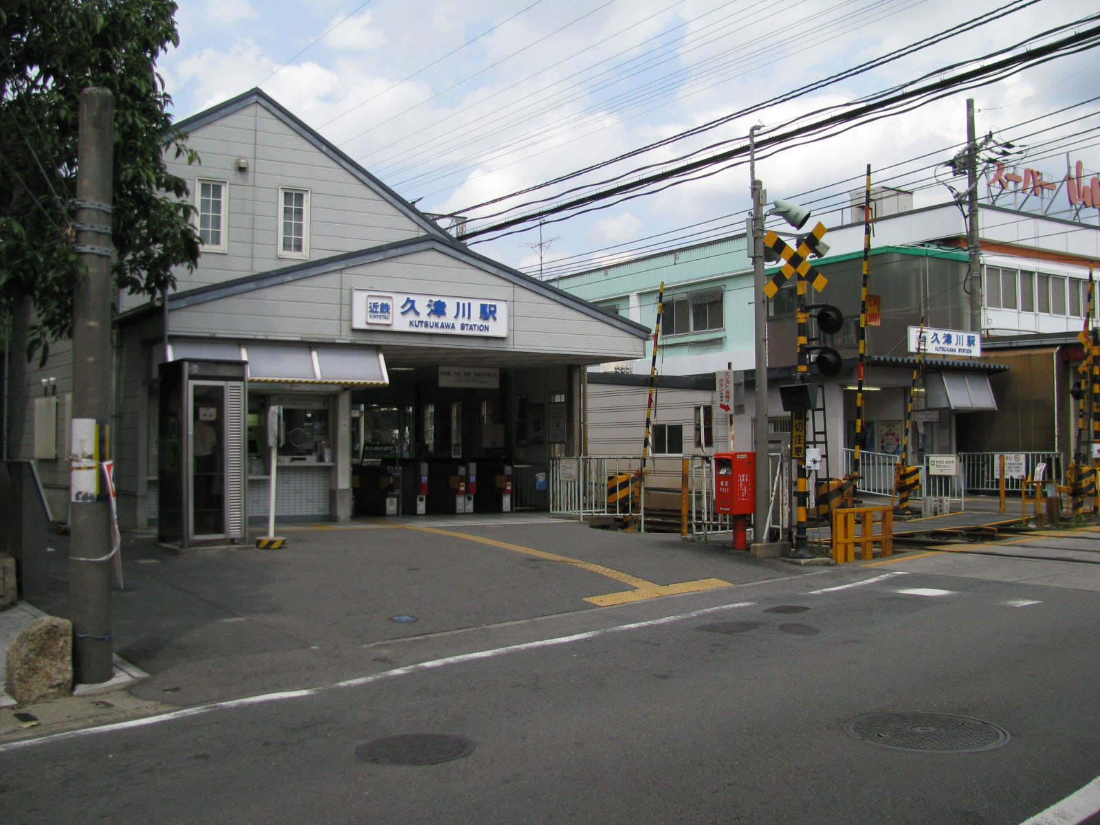 近鉄久津川駅